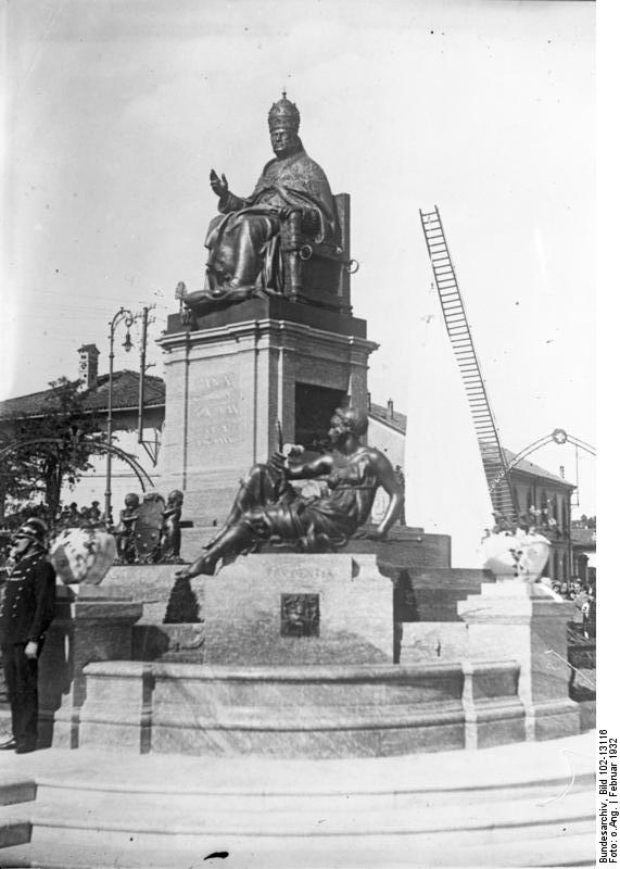 10 Jahre Papst Pius XI. ! Zur Feier der 10 jährigen Wiederkehr des Krönungstages Papst Pius XI. fand an dem neuen Papst-Denkmal in Mailand eine Feier statt. Information added by Wikimedia users.Statua esposta a Milano per il decennale dell'incoronazione di papa Pio XI, nel 1932.